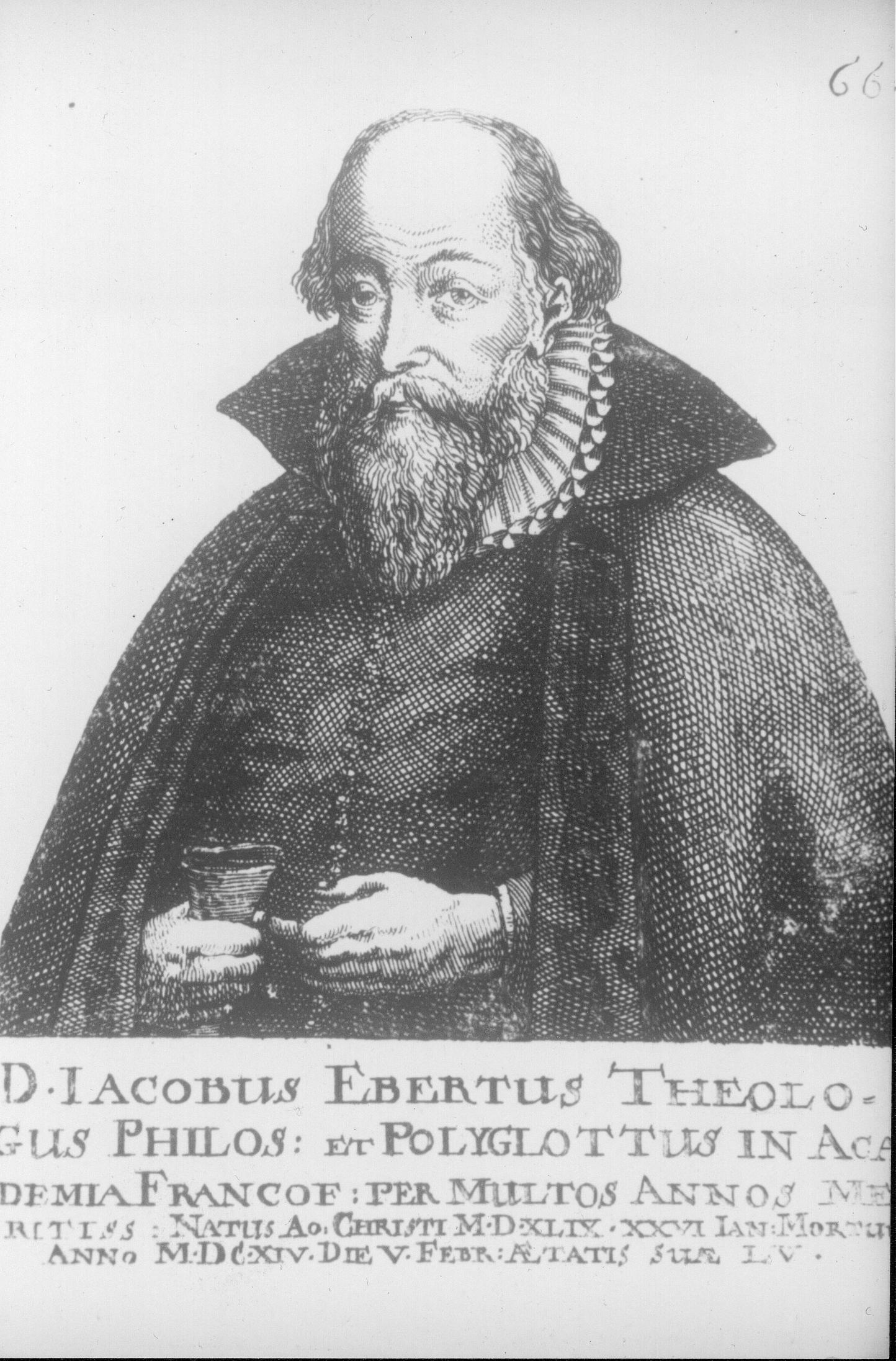 Stich von Jakob Ebert (1549–1614), deutscher Theologe